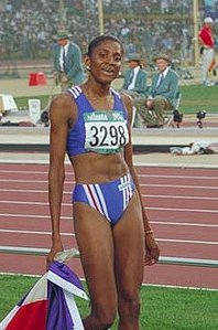 Marie-José Pérec during 1996 Olympic Games